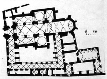 Домініканський костел Кам'янець-Подільський